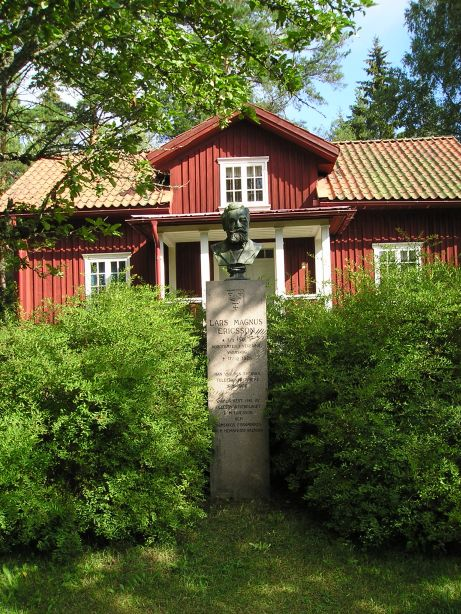 Foto på LM Ericssongården i Värmskog, Värmland.